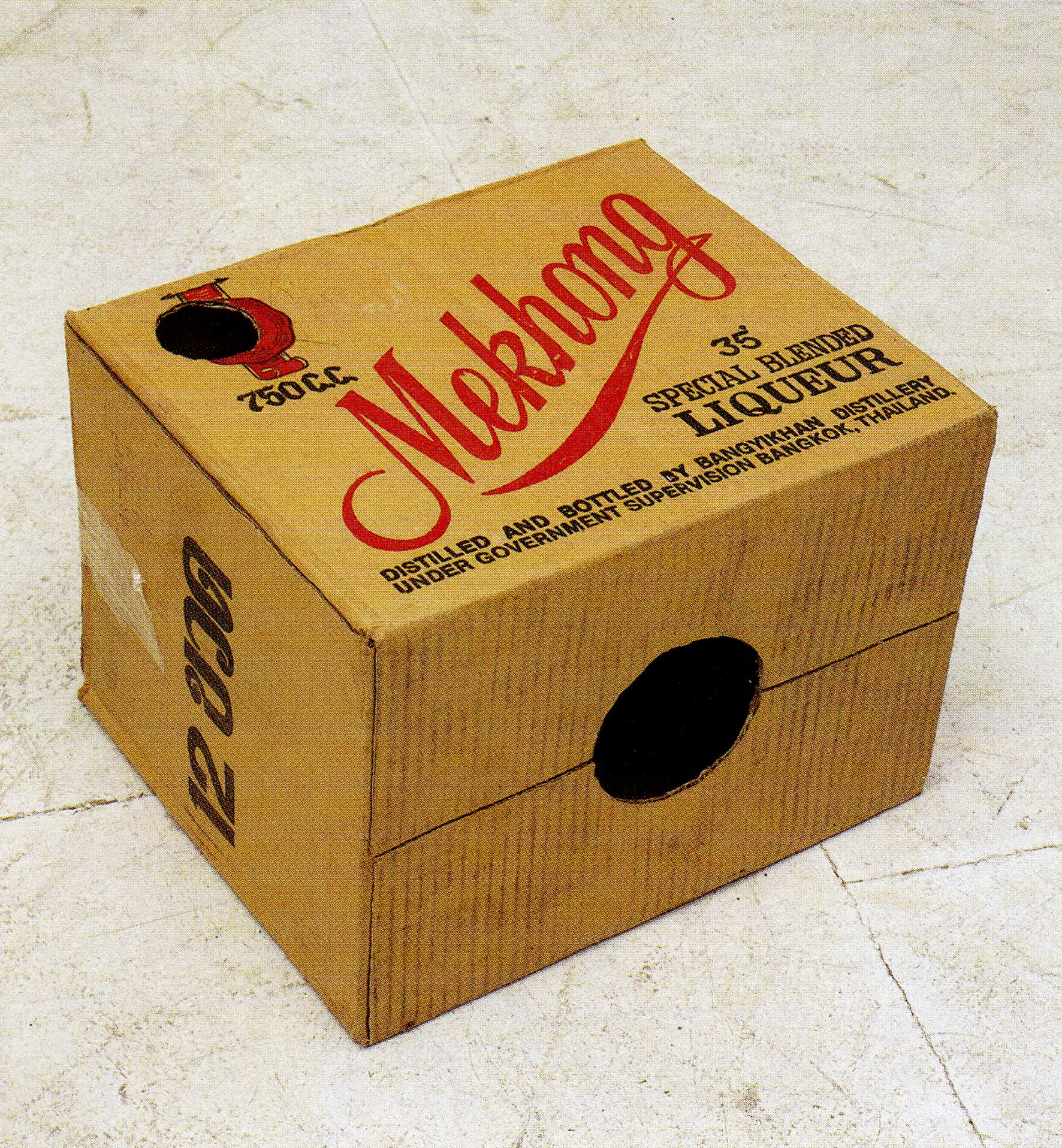 Mekhong Peep-Box, 1992